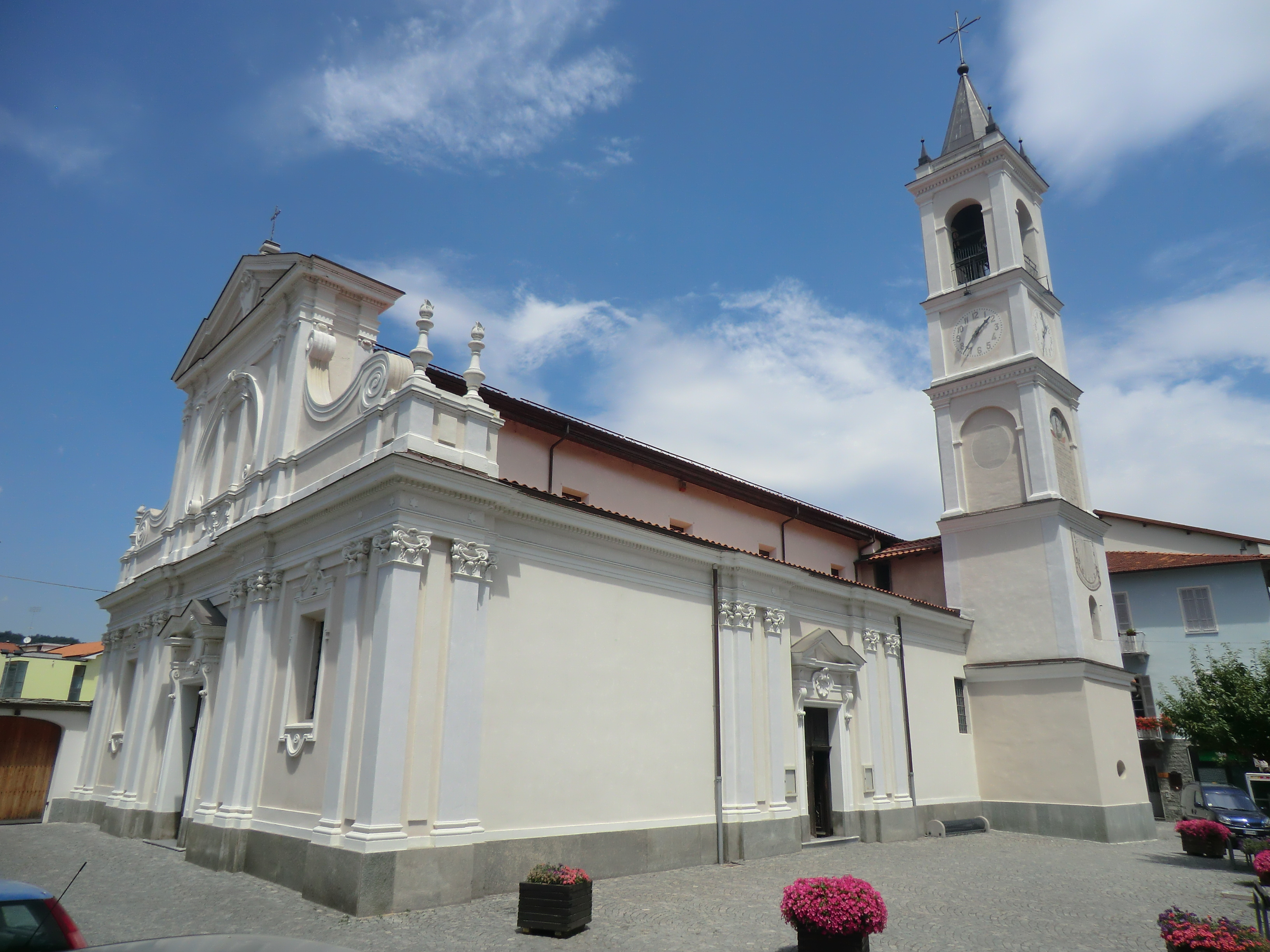 Roccavione (Cuneo): chiesa delal Visitazione di Maria (sec. XVII)